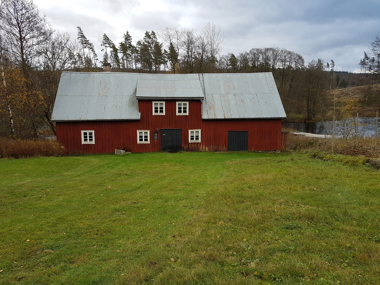 Tullkvarnen i Nybygget i Simlångsdalen som sedan 1967 tillhör Breareds Kulturhistoriska Förening